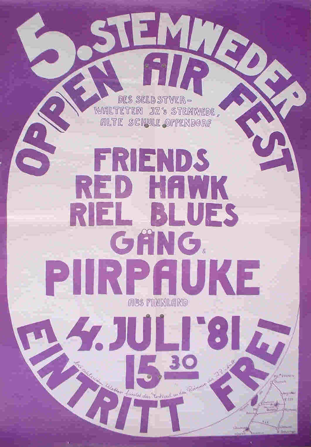 Plakat 5. Stemweder Open Air